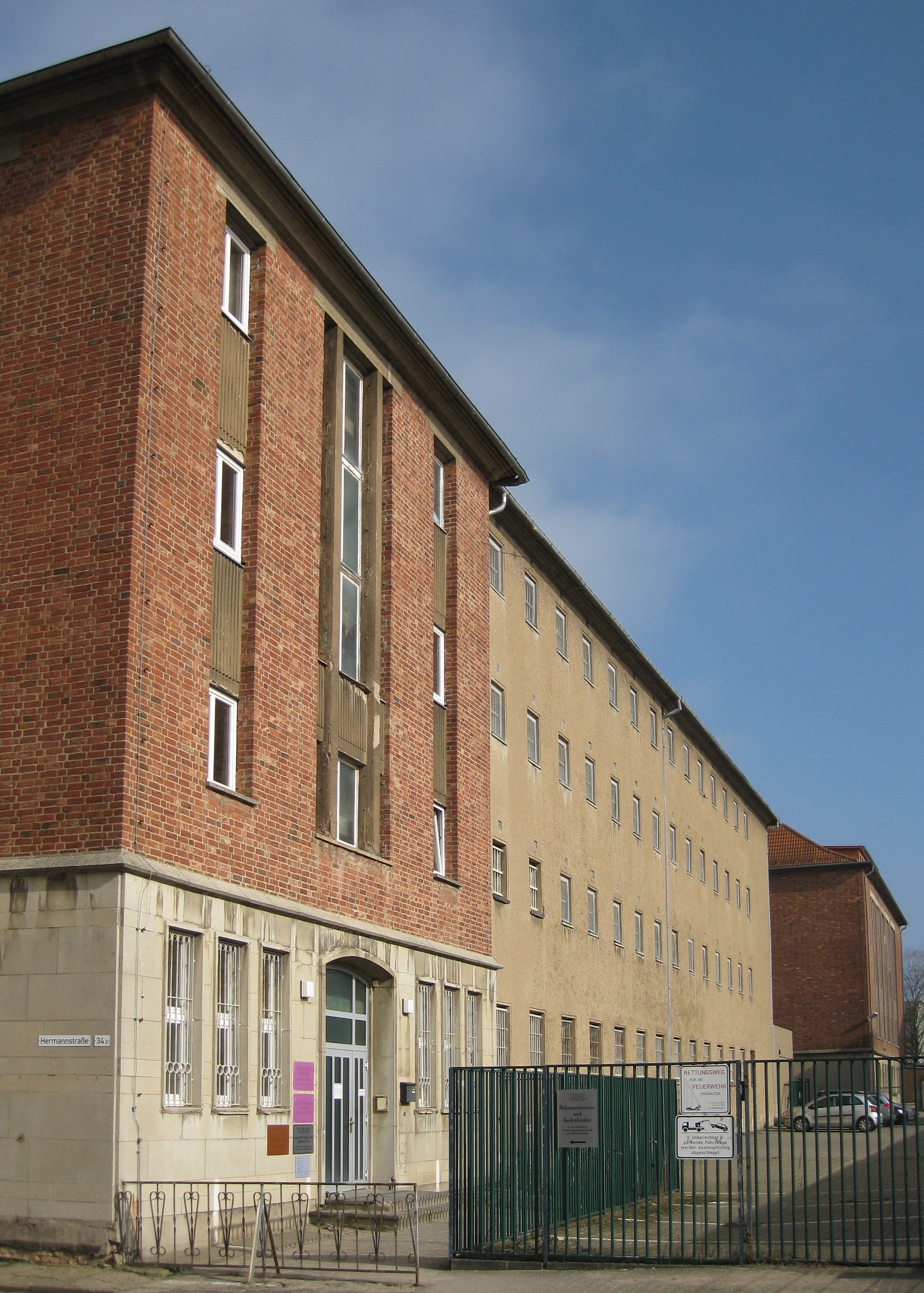 Rostock, Deutschland: Dokumentations- und Gedenkstätte in der ehemaligen Untersuchungshaftanstalt des Ministeriums für Staatssicherheit (MfS) der Deutschen Demokratischen Republik (DDR); Aussenansicht des Gebäudes Hermannstraße 34b (Zugang über Augustenstraße/Grüner Weg), Hofseite vom „Haus der Justiz“. Das Gebäude befindet sich auf dem ehemaligen Gelände der Bezirksverwaltung des Ministeriums für Staatssicherheit.